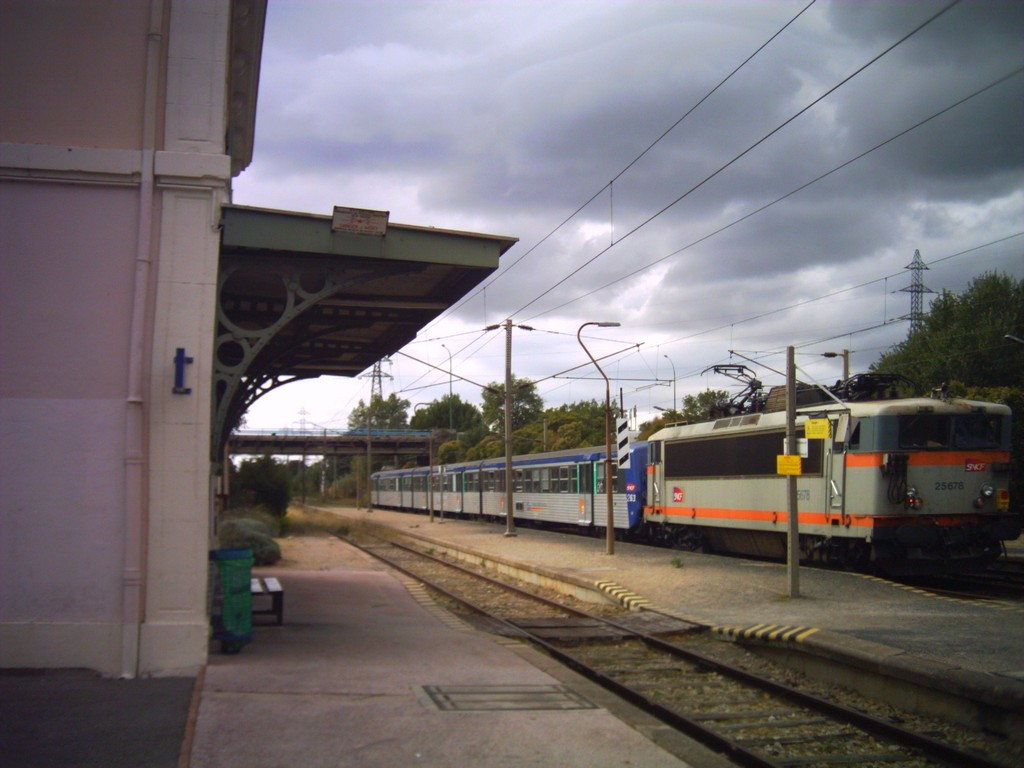 Une rame réversible quitte la gare direction Marseille